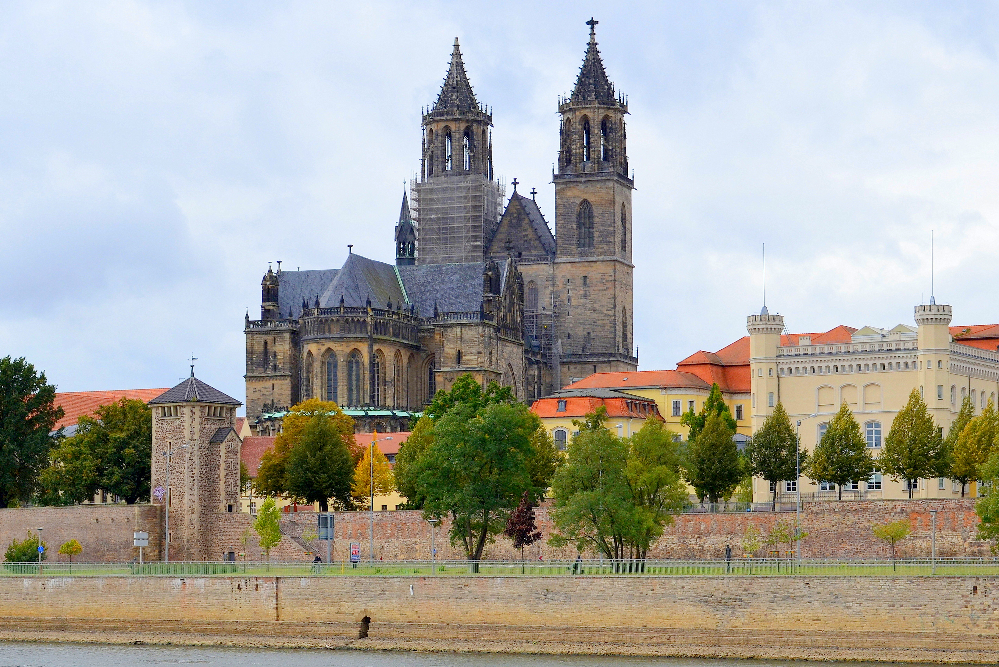 Domkerk van de Hl. Katharina en Mauritius van Maagdenburg